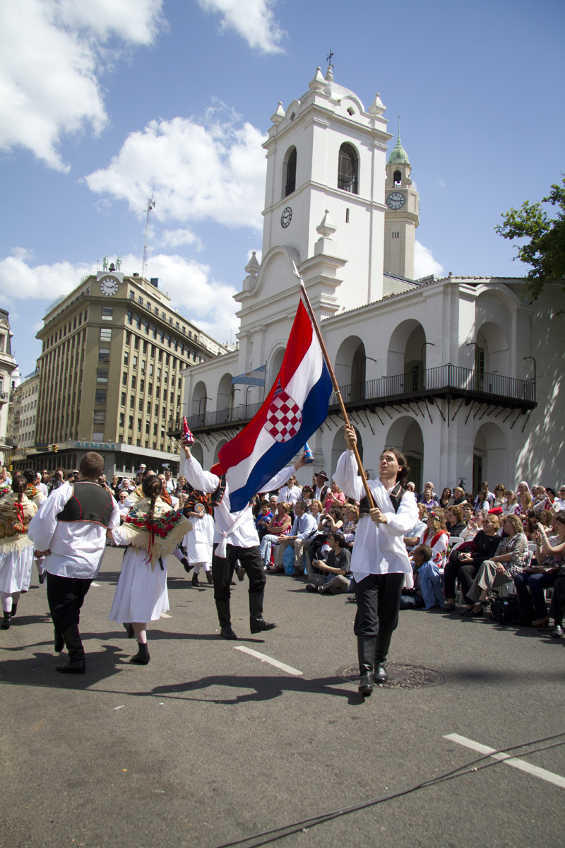 ( Foto: Estrella Herrera)